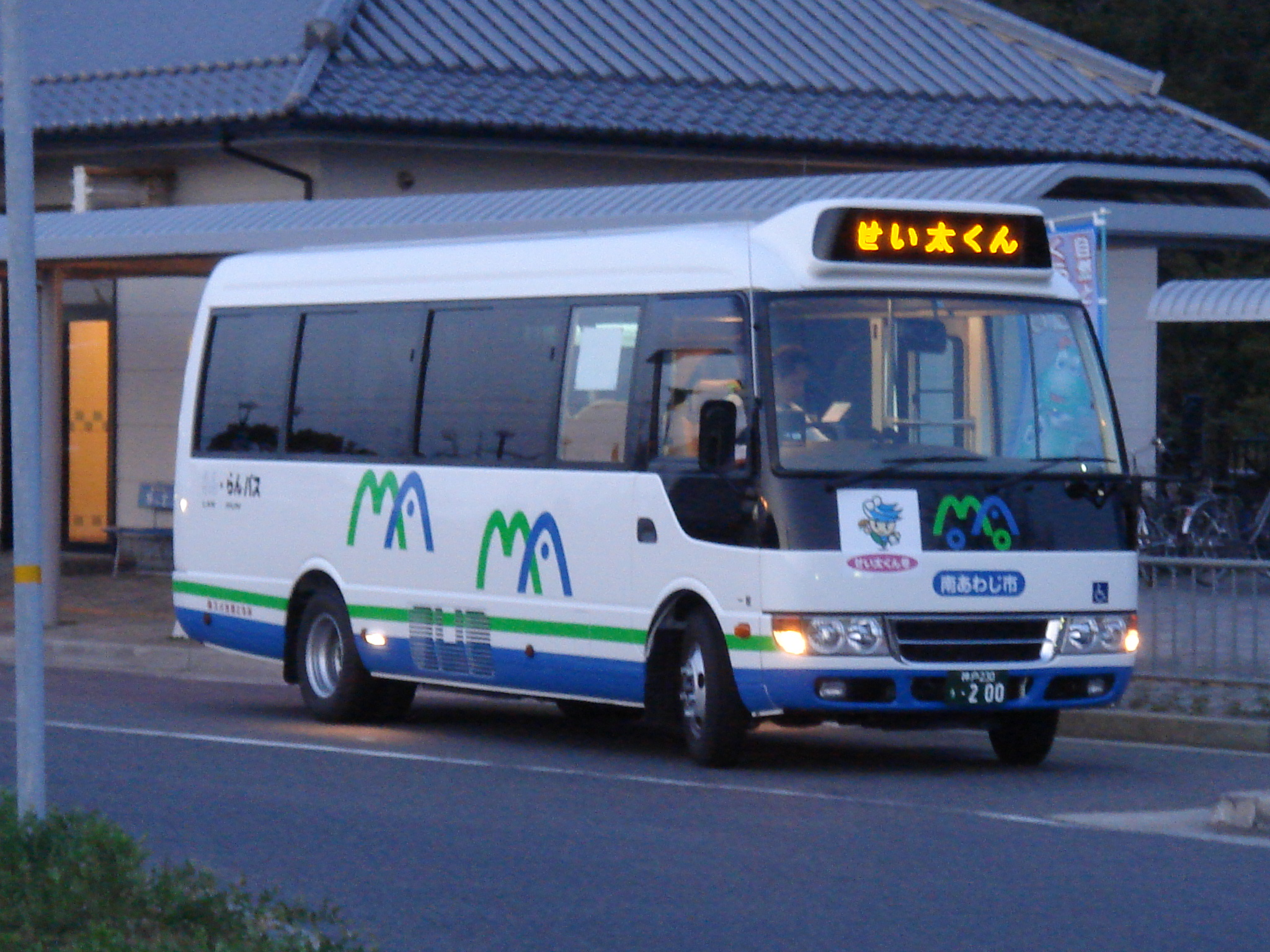 みなと観光（南あわじ市）のコミュニティーバス Minato Kanko Bus Community